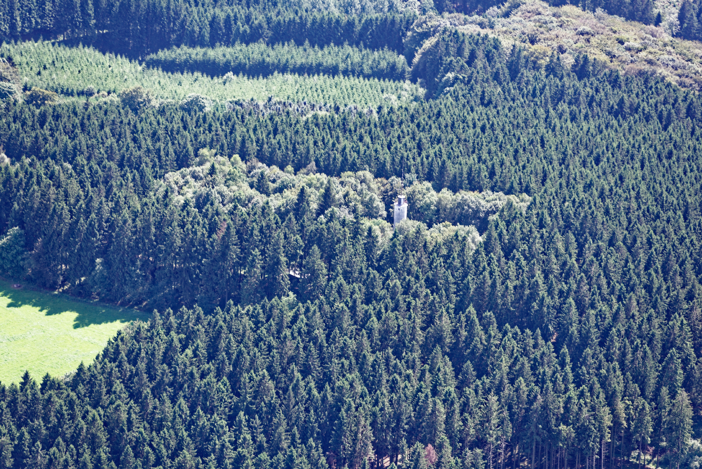 Fotoflug Sauerland West. Luftaufnahme: Homertturm, Lüdenscheid, Nordrhein-Westfalen. Blick Richtung Süden.